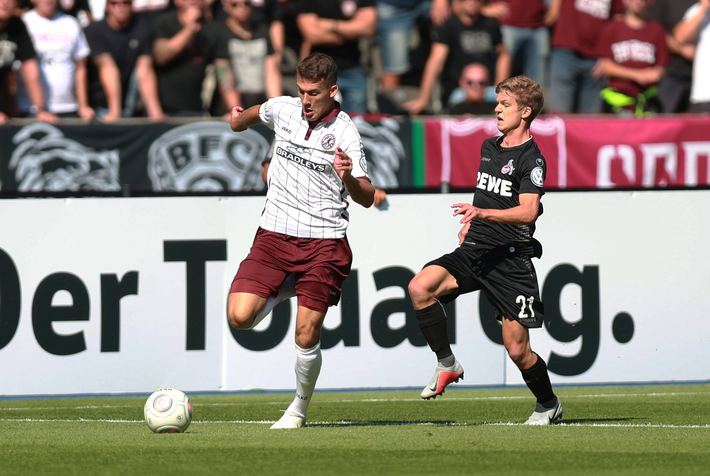 DFB-Pokal 2018/19, 1. Hauptrunde: BFC Dynamo gegen 1. FC Köln 1:9 (1:4)